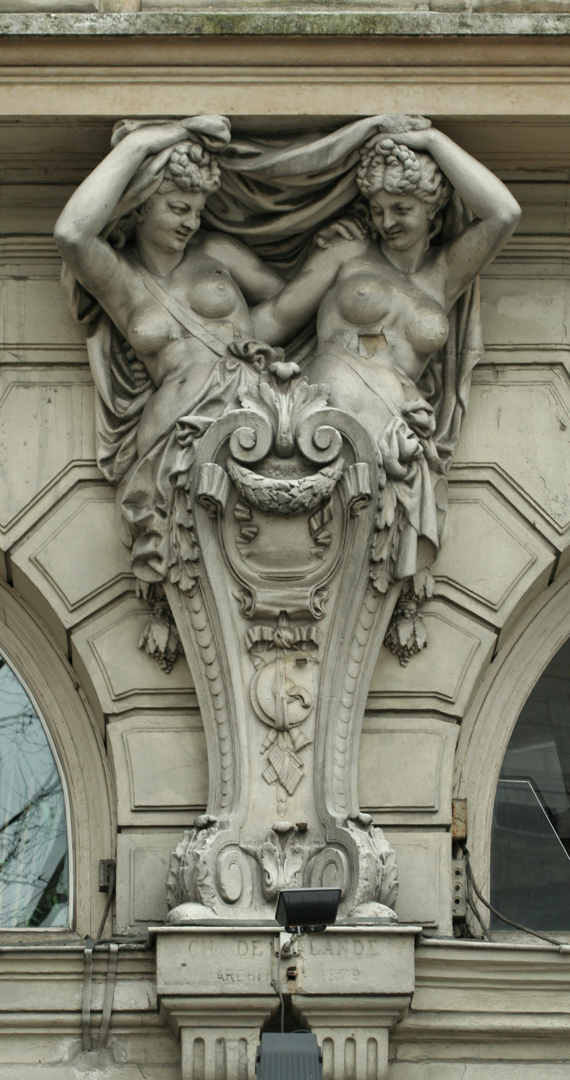 Caryatides du théâtre de la Renaissance, Paris. This image was created with Hugin.